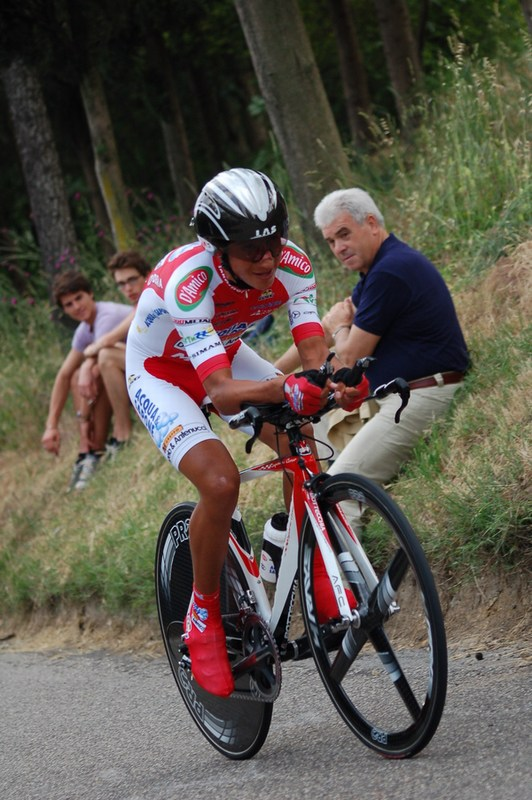 Cayetano Sarmiento lors du Tour d'Italie 2010